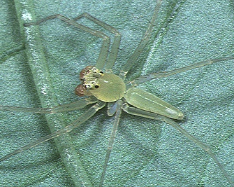 male Onomastus kanoi from Okinawa.